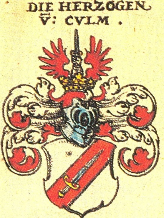 Wappen der Fränkischen Adelsfamilie Herzog von Culm